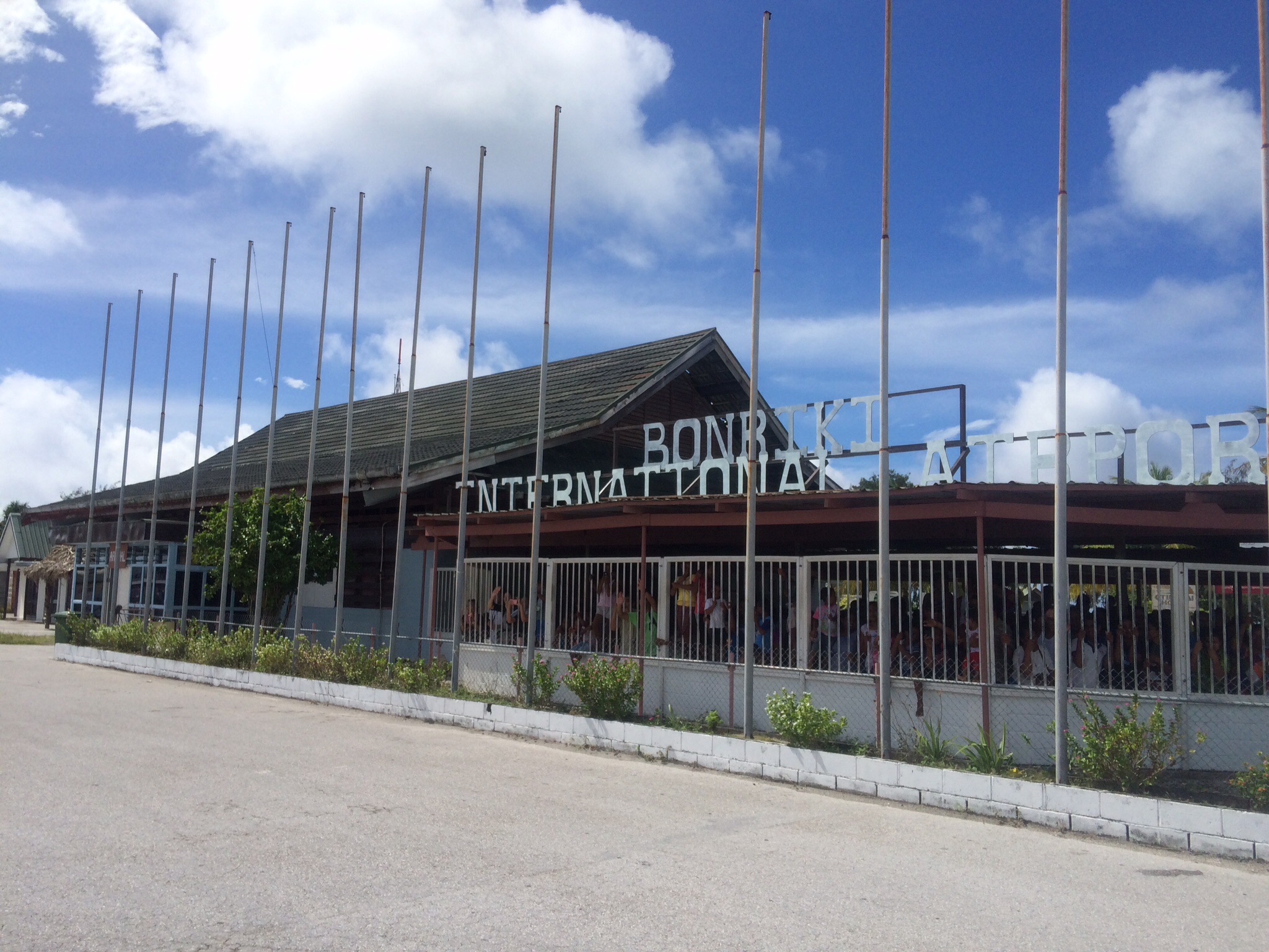 Terminal de l'aéroport de Bonriki à Tarawa-Sud